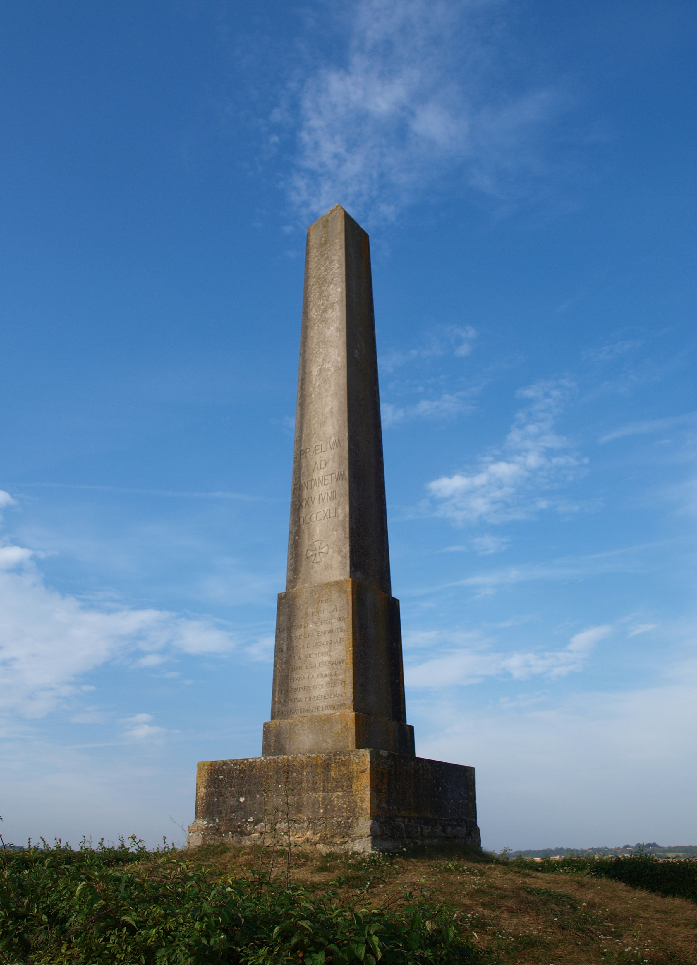 Fontenoy-en-Puisaye (Yonne, France) , l’obélisque de la bataille de 841